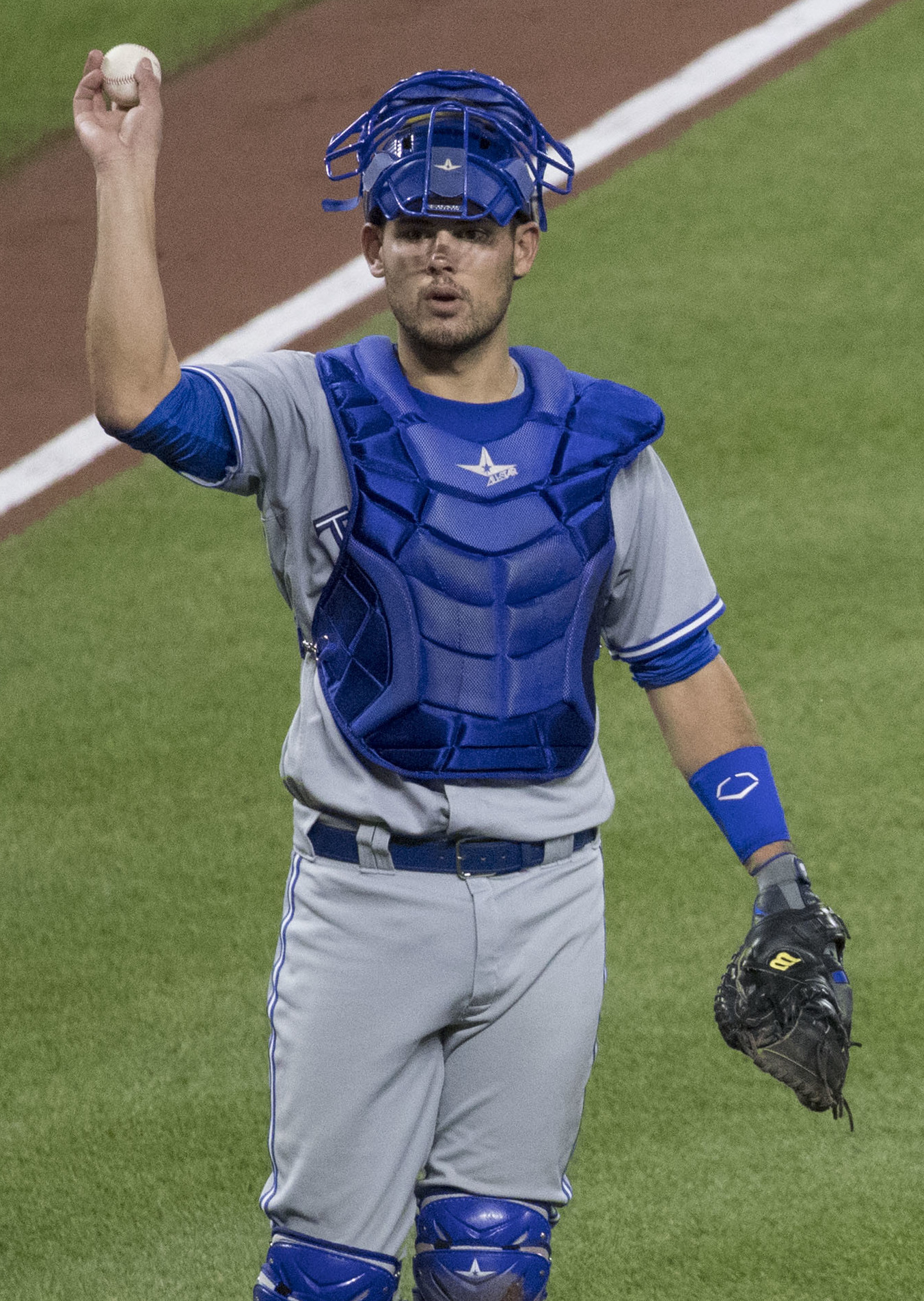 Blue Jays at Orioles 5/19/17